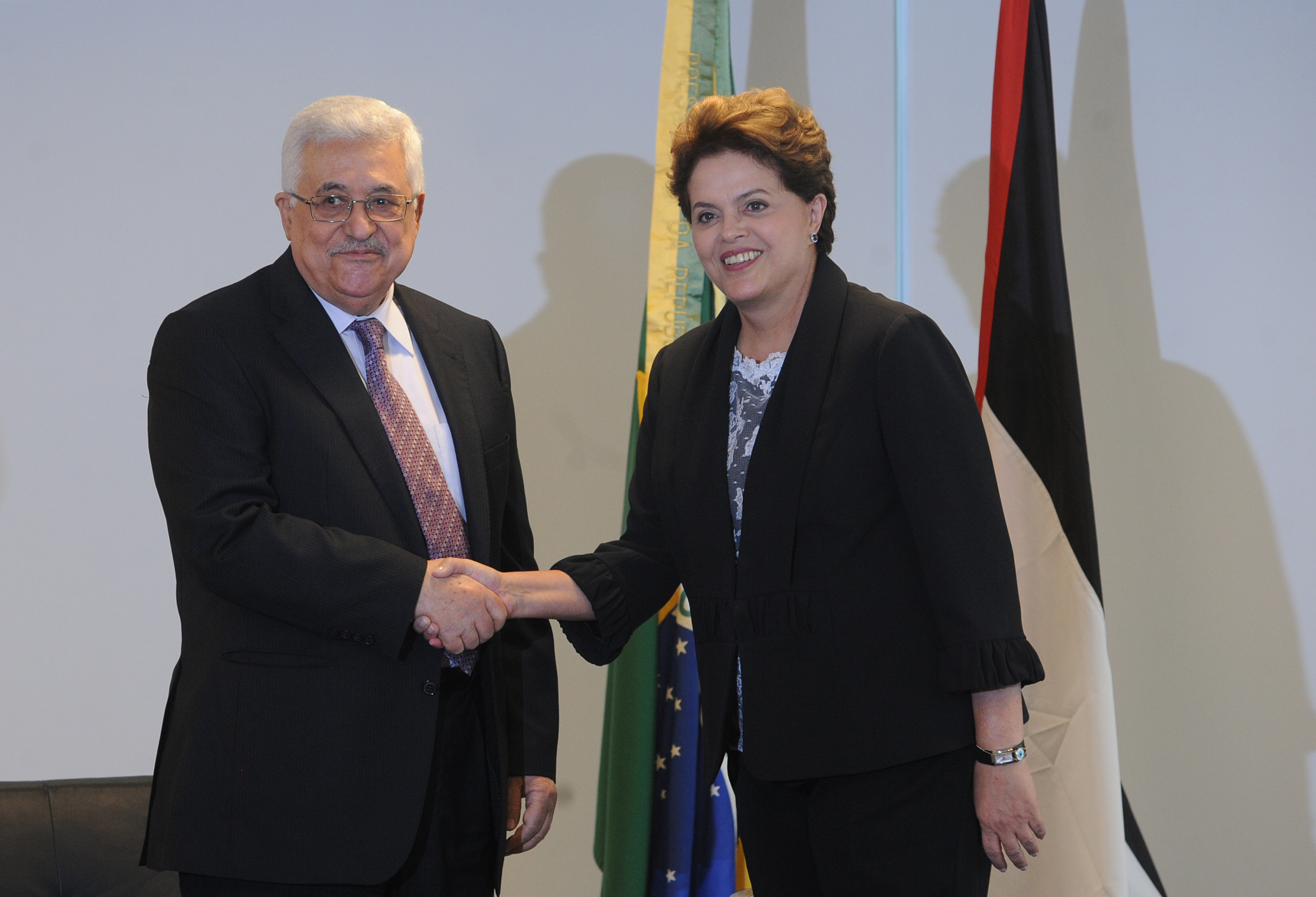 A presidenta Dilma Rousseff recebe o presidente da Autoridade Nacional Palestina, Mahmoud Abbass, no Palácio do Planalto. Brasília, 2 de janeiro de 2011.